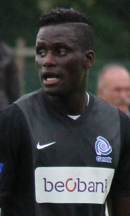 Kara Mbodj